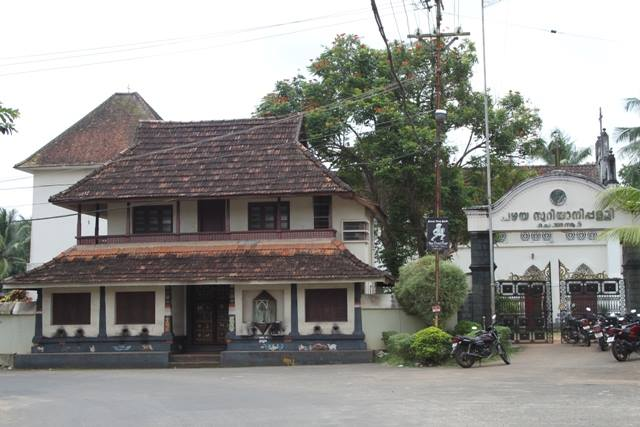 പഴയ സുറിയാനി പള്ളി